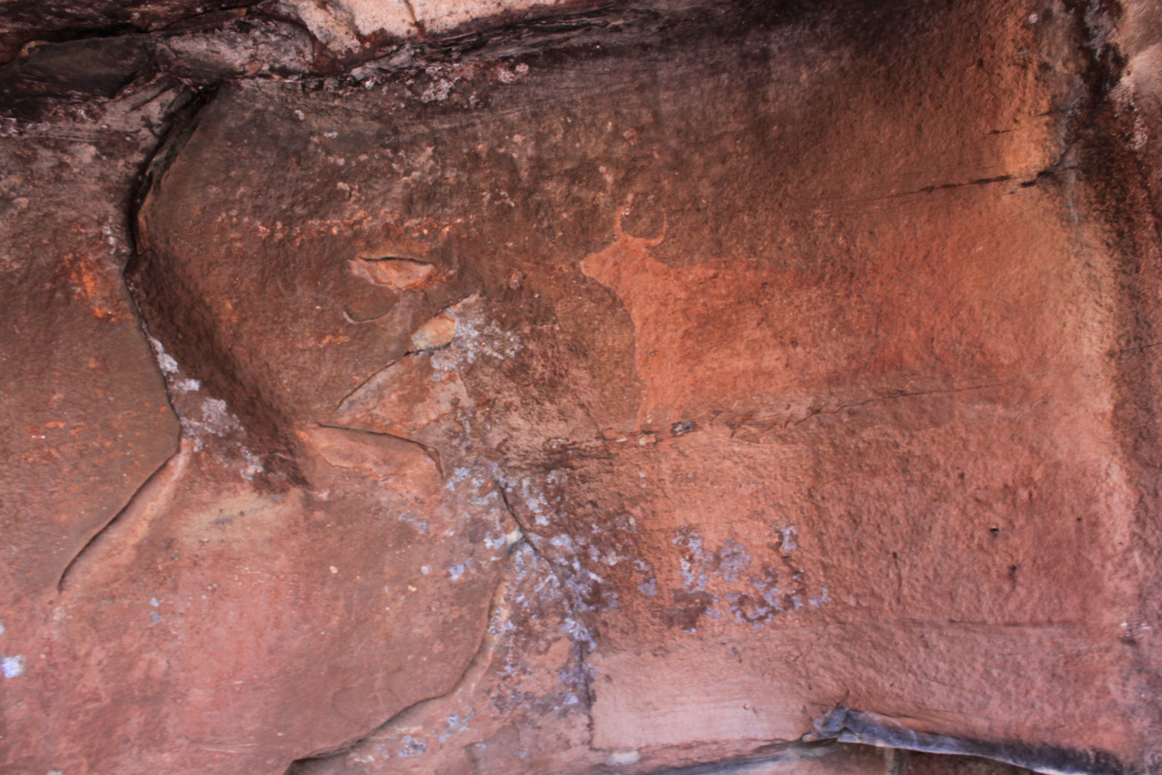 Abrigo de Cocinilla del Obispo situado en la Sierra del Rodeno en el término municipal de Albarracín, Teruel, España.